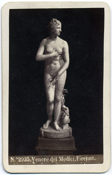 Giorgio Sommer (1834-1914), Venere dei Medici. Firenze. Foto, del 1880 circa, di una celebre scultura ellenistica, alla Galleria degli Uffizi di Firenze. Numero di catalogo: 2935.